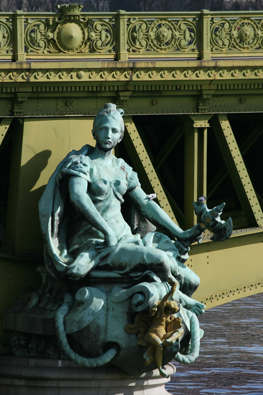 Jean-Antoine Injalbert (french, 1845-1933): La Ville de Paris, 1897, statue monumentale en bronze, Paris, Pont Mirabeau.